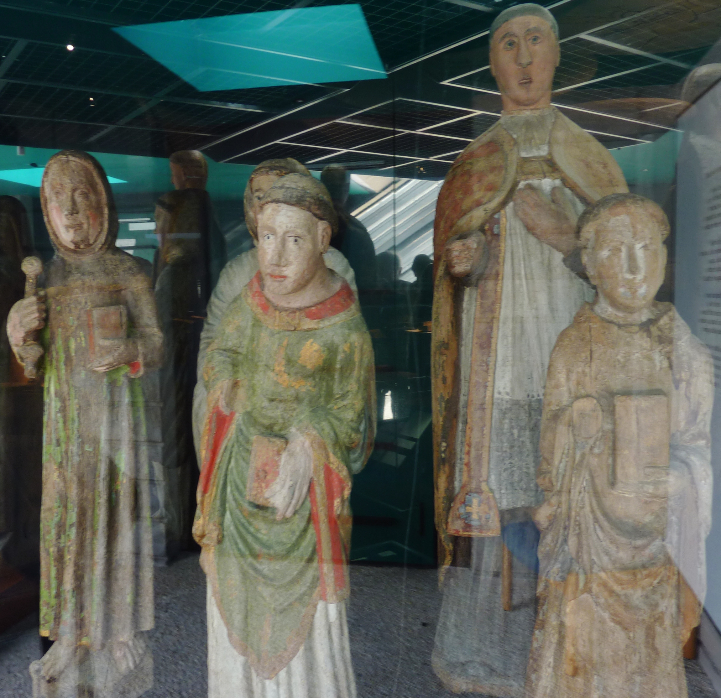 Cinq statues de saint Guénolé : de gauche à droite : en bois polychrome du XVe provenant de Kergloff; en bois polychrome du XVIIe pour les deux suivantes (origine non précisée) ; en bois polychrome du XVIIe provenant de l'île de Sein ; en bois polychrome du XVe (origine non précisée) (Musée de l'ancienne abbaye de Landévennec)